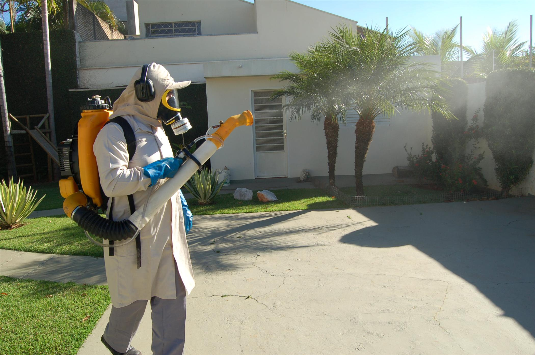 Agente da prefeitura de Votuporanga, Brasil, dedetizando uma residência.